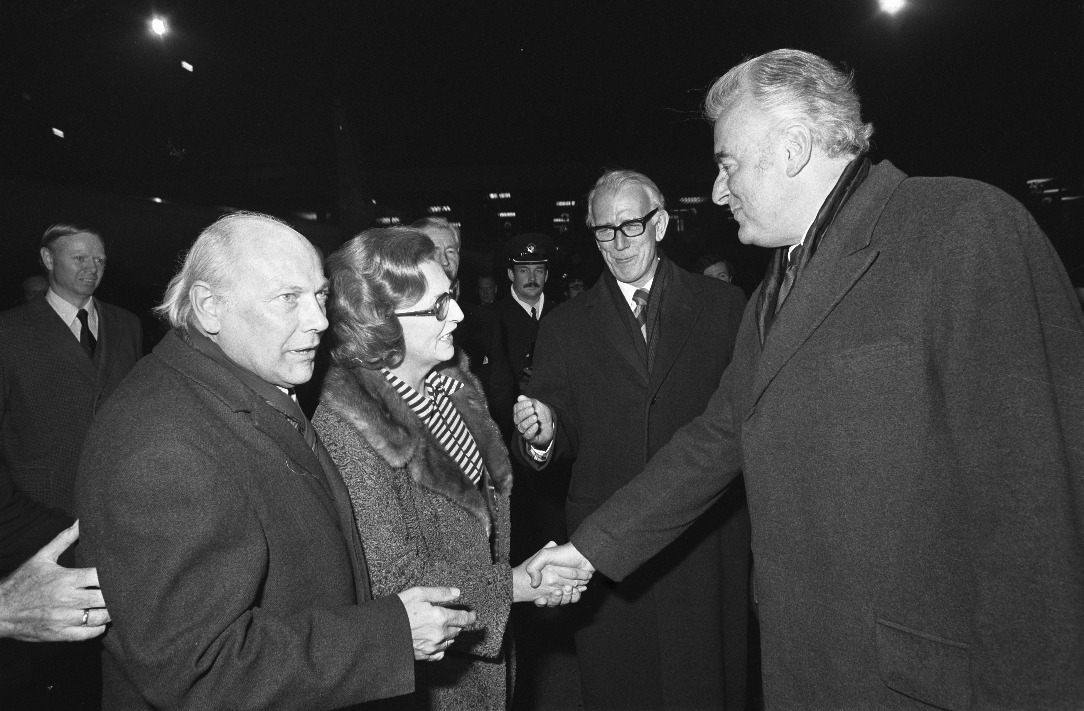 Collectie / Archief : Fotocollectie Anefo Reportage / Serie : [ onbekend ] Beschrijving : Australische premier Edwin G. Whitlam en echtgenote op Schiphol; Whitlam (r) begroet Den Uyl Datum : 3 januari 1975 Locatie : Australië Persoonsnaam : Uyl, Joop den, Whitlam, Edwin G. Fotograaf : Mieremet, Rob / Anefo Auteursrechthebbende : Nationaal Archief Materiaalsoort : Negatief (zwart/wit) Nummer archiefinventaris : bekijk toegang 2.24.01.05 Bestanddeelnummer : 927-6730